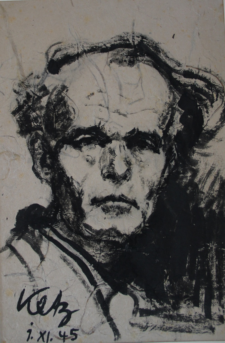 Selbst 1.11.45, Tuschzeichnung von Fritz Ketz